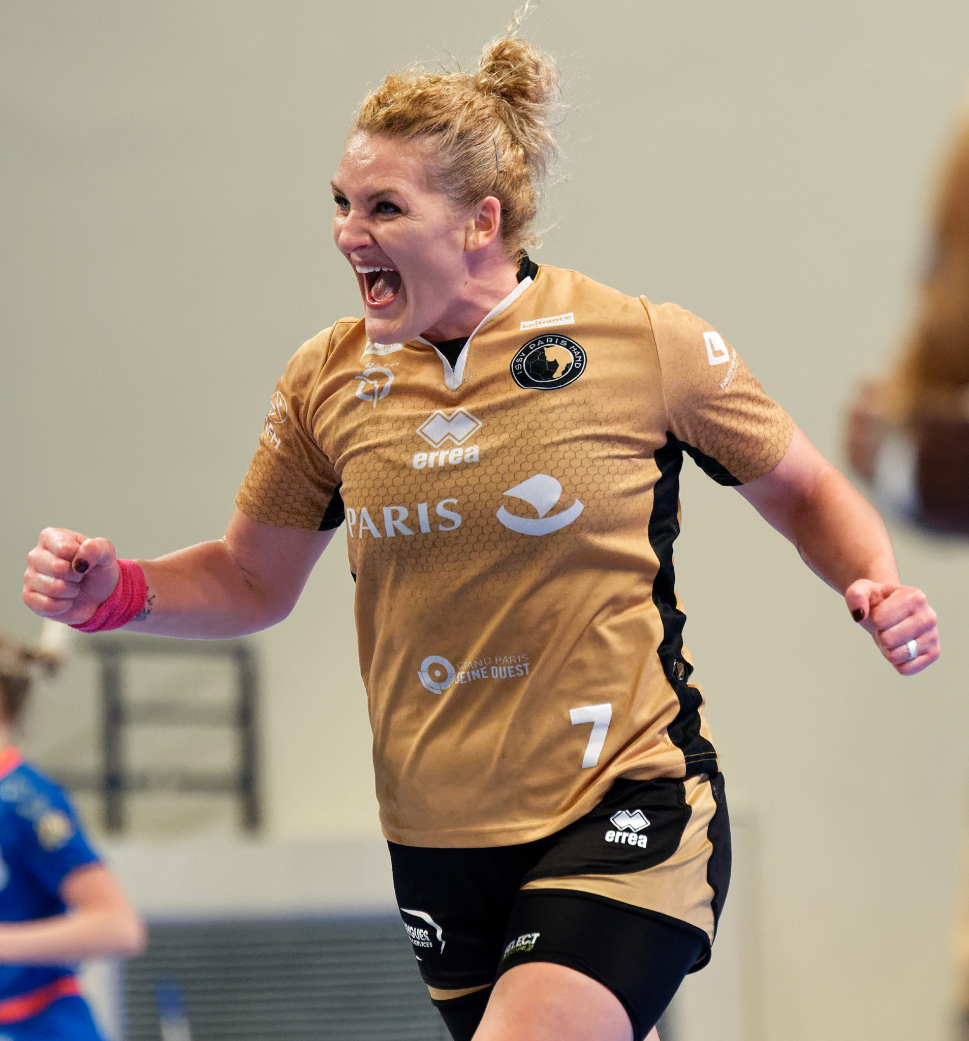 Match de coupe EHF entre Issy Paris Hand et les russes de Lada. A Coubertin, le 12 janvier 2018.